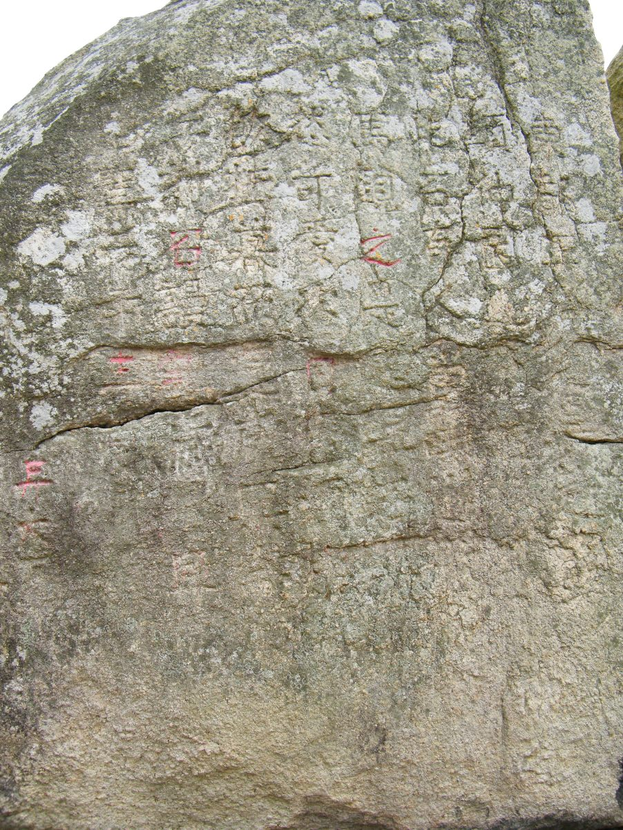 岗背北宋绍圣三年（1096）叠石石刻 全文：东都王凰之吴越钱颐仲因过此地见此石有人留题遂立马观之是处巨石平然可爱次日携酒乐饮扶暮而还因兴命工刻石谩记岁月耳绍圣三年三月 （岗背，位于达濠西约五公里，濠江西岸）